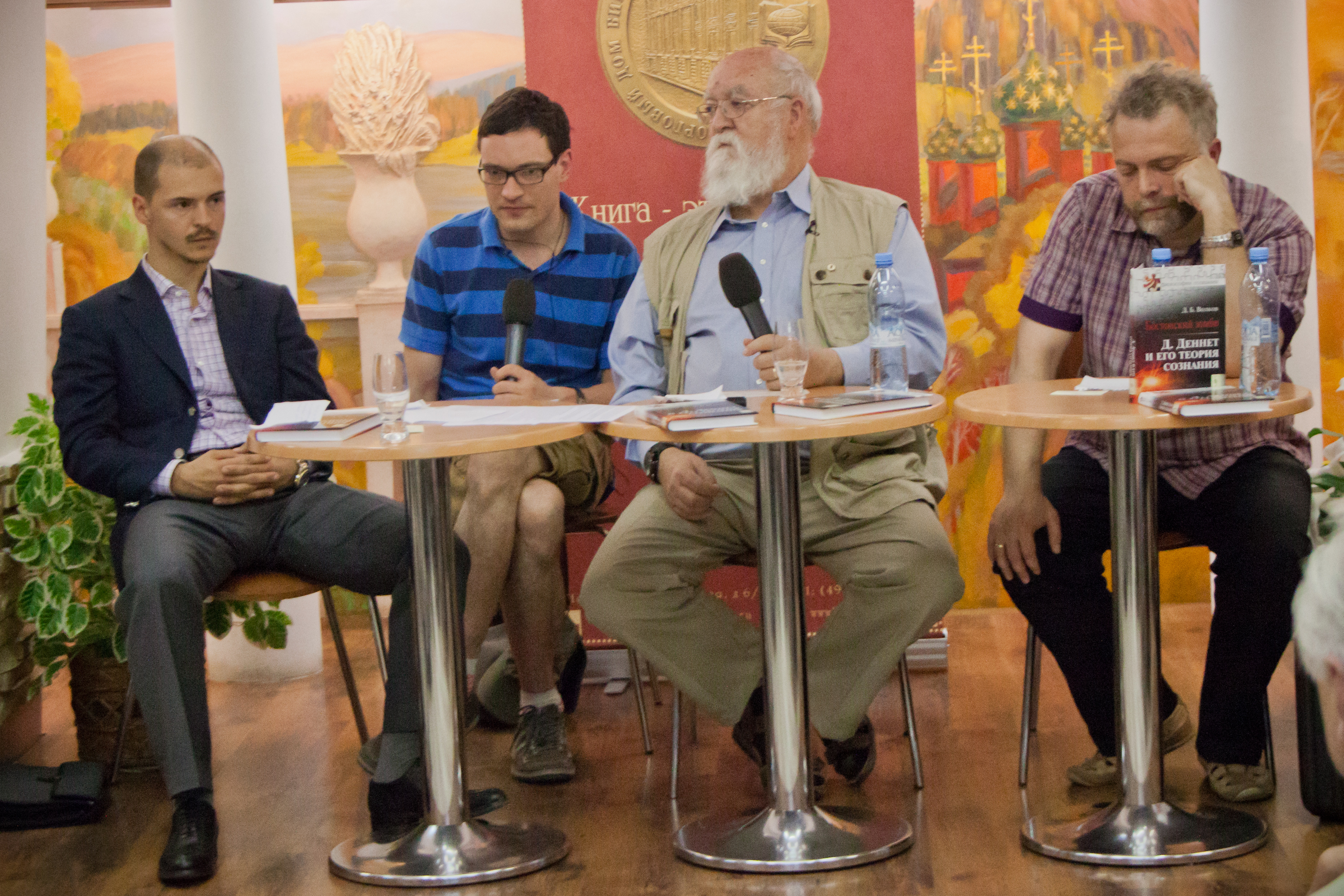 Дмитрий Волков, Дэниел Деннет, Вадим Васильев, Андрей Веретенников на презентации книги Дмитрия Волкова «Бостонский зомби: Дэниел Деннет и его теория сознания» в магазине "Библио-Глобус" (Москва, 2012)